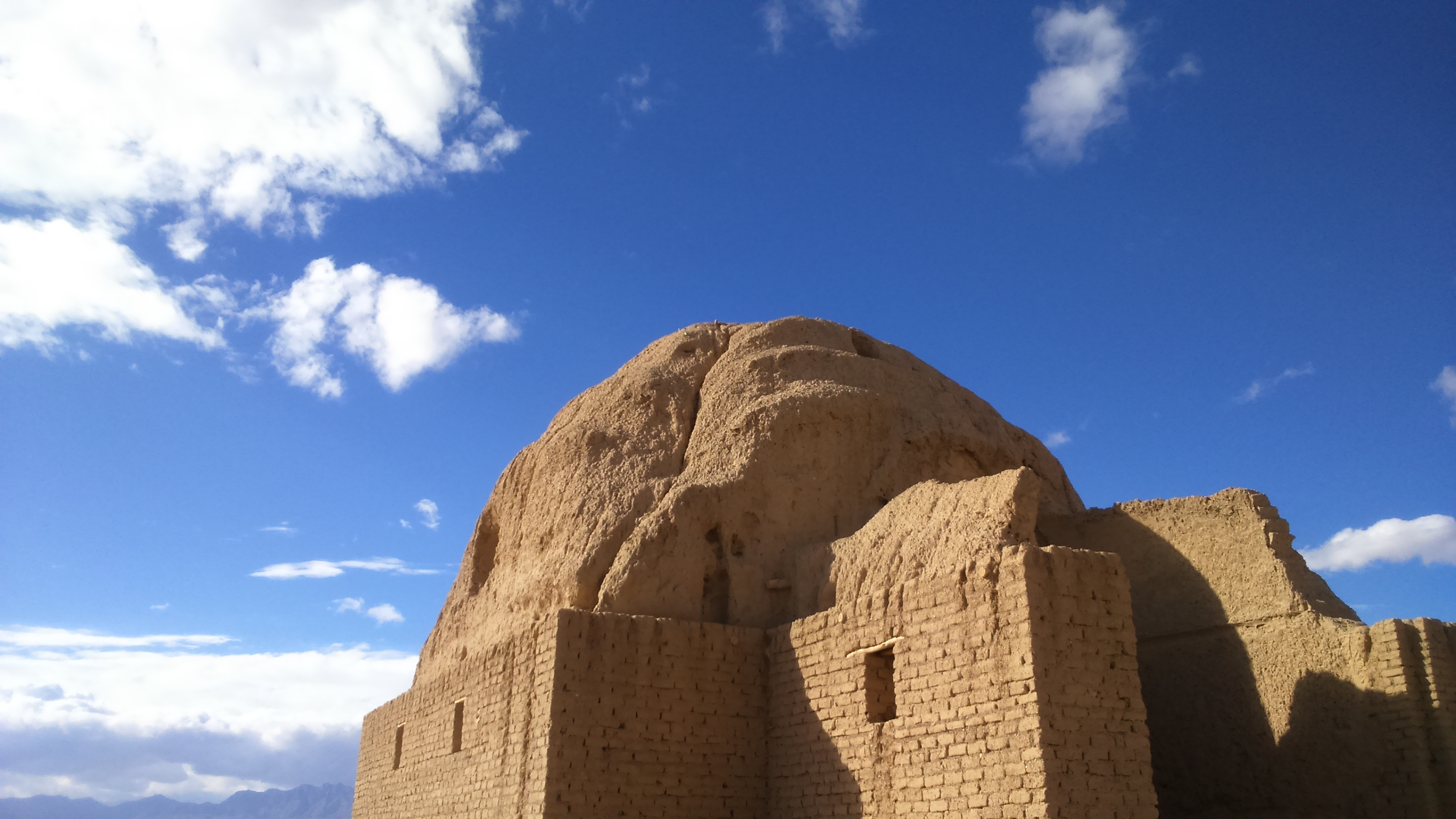 نمای زیبایی از گور شاه